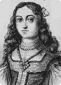 Dieser Kupferstich der jungen Dichterin (ca. 1650?) wurde auf der folgenden Webseite gefunden